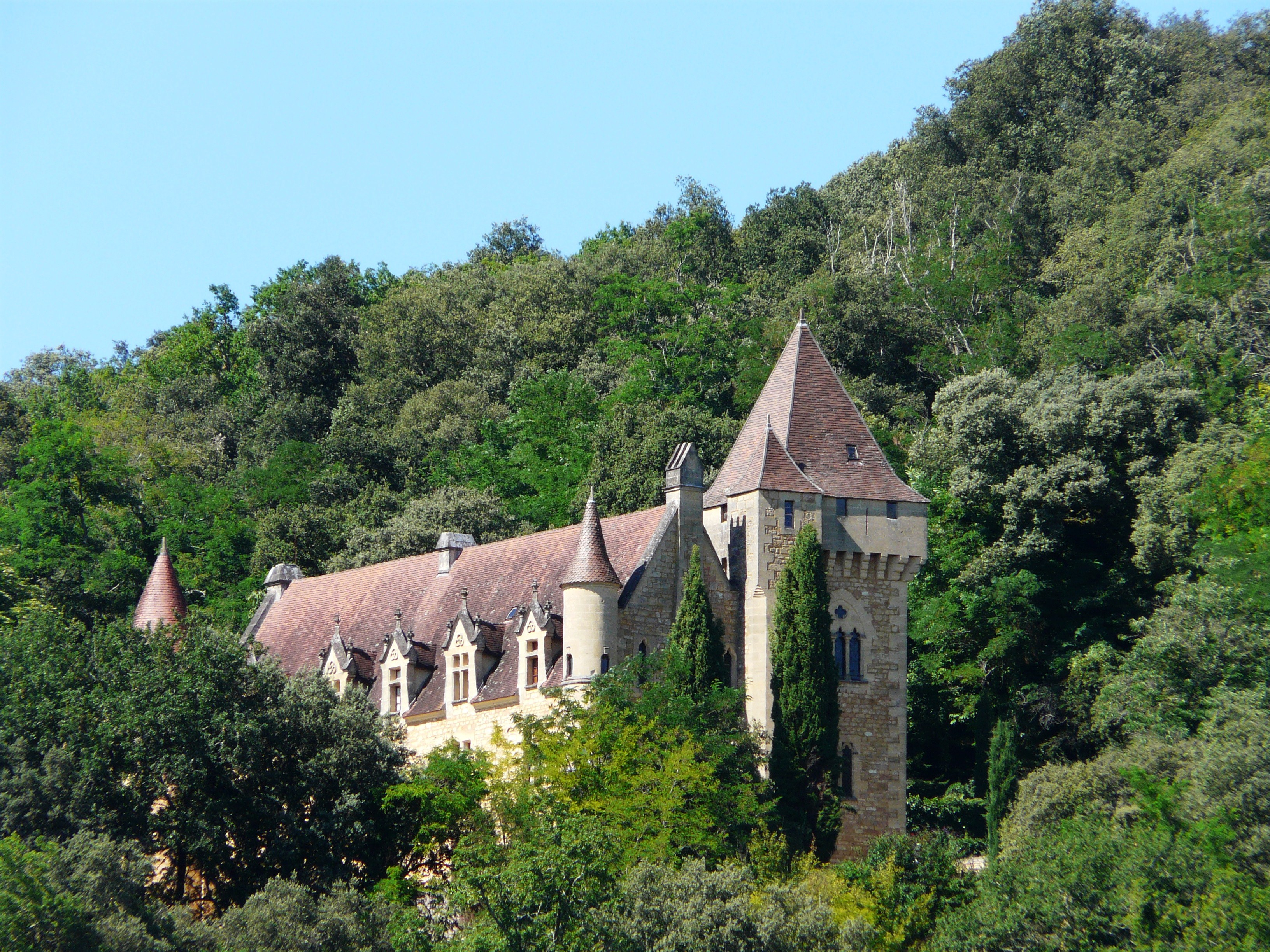 Le château de Rouffillac vu du sud, Carlux, Dordogne, France.